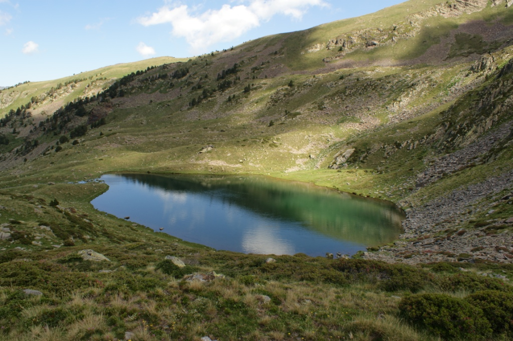 L'EstanyÃ³ This is a a photo of a lake or pond in Andorra with id: IEA-BE-50